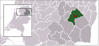 Locatie van Gieten aangegeven binnen de gemeente Aa en Hunze.